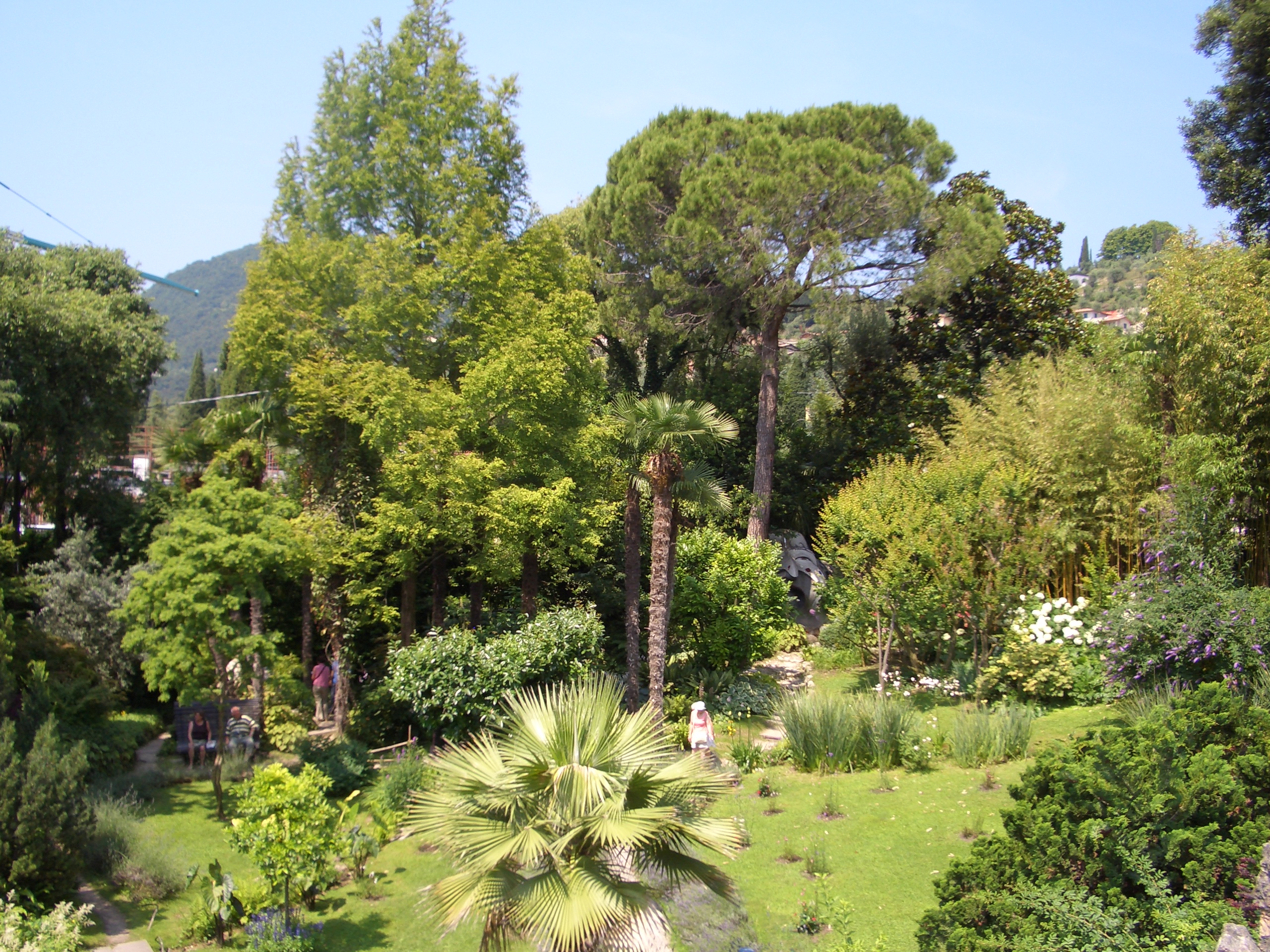 Giardino Botanico André Heller in Gardone Riviera